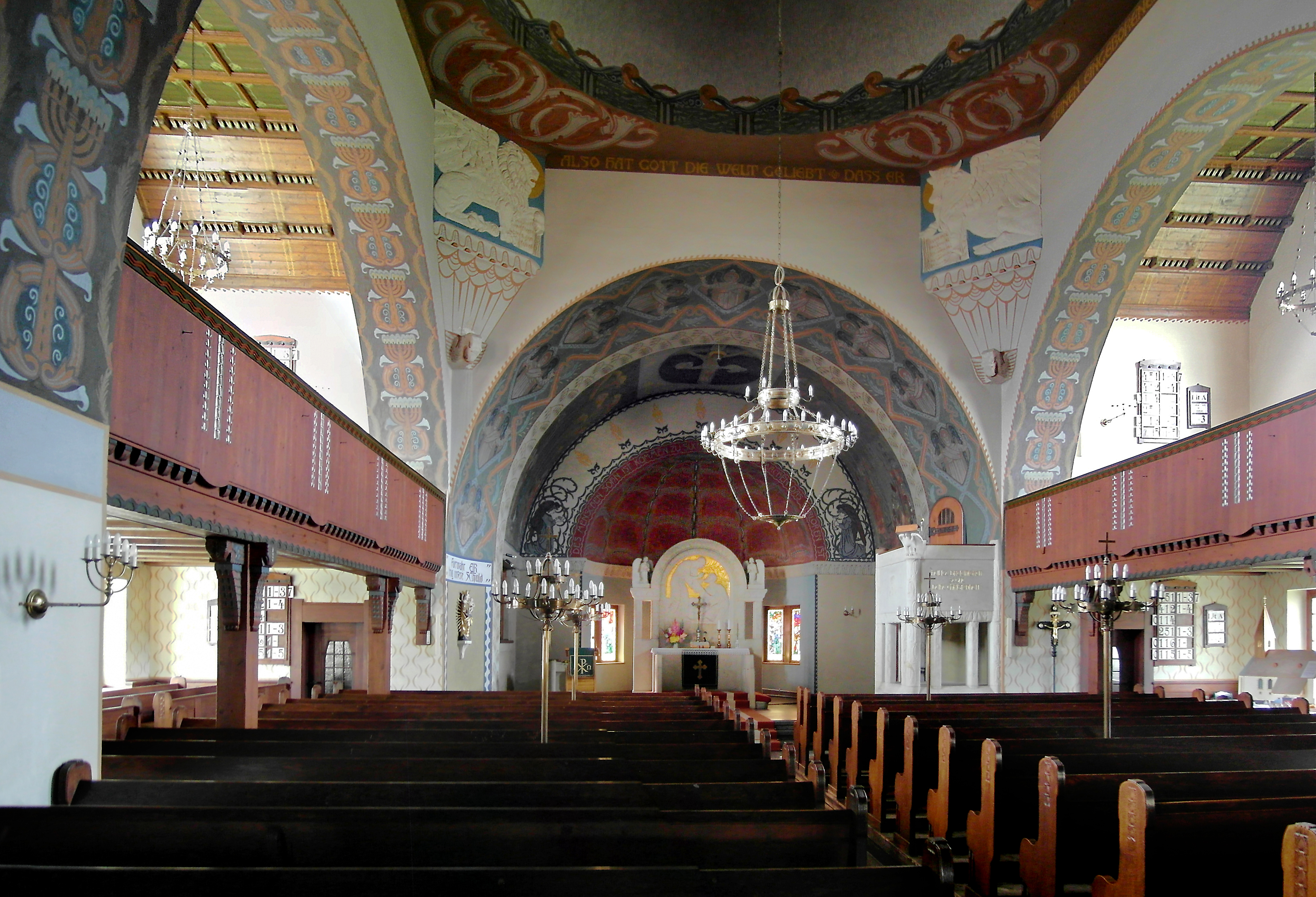 11.09.2017 09488 Wiesa (Thermalbad Wiesenbad), An der Kirche 1: St. Trinitatiskirche (GMP: 50.611754,13.019376). Erbaut 1903/04 im Jugendstil nach Plänen von Schilling & Graebner.[SAM1950+52.JPG]20170911230MDR.JPG(c)Blobelt